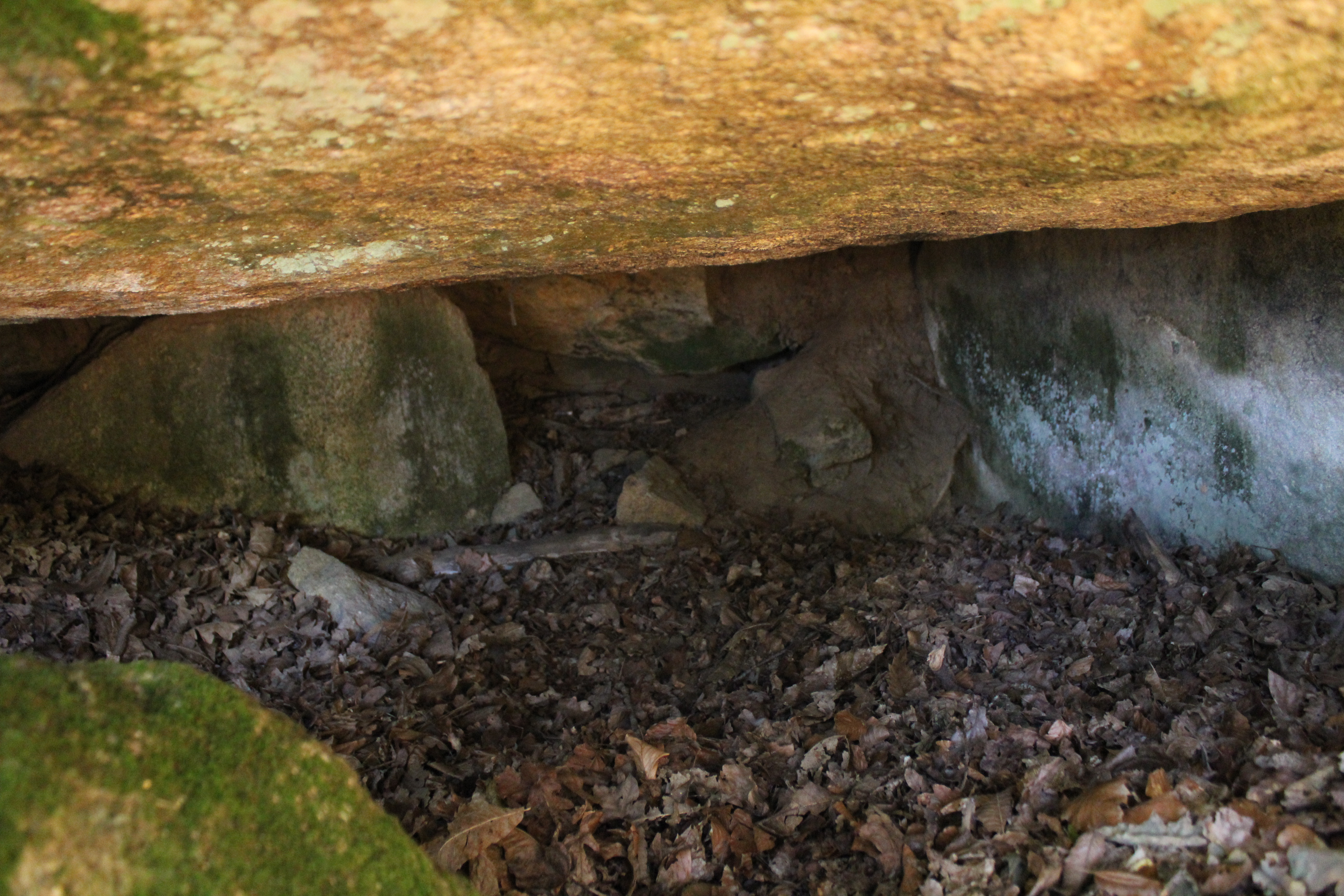 Vue intérieure. .